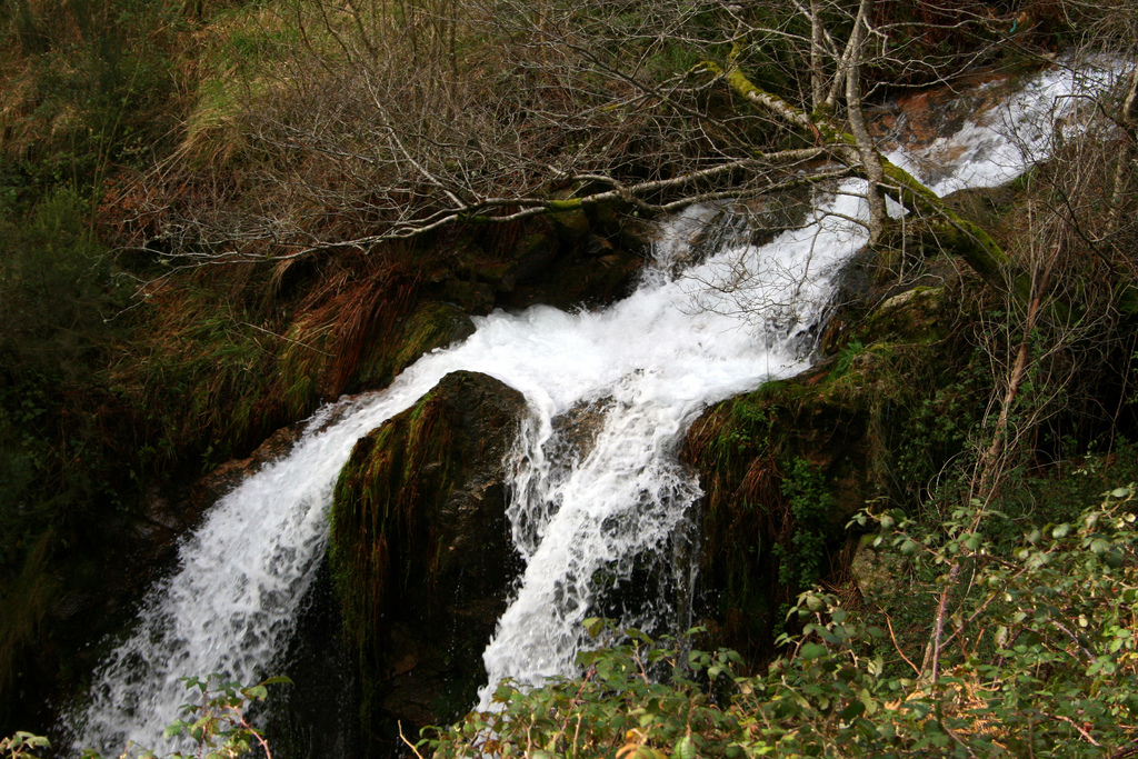 Fervenza do Río Mouro, no lugar homónimo no Monte Castrove.